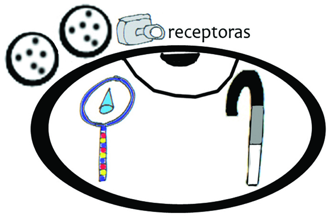 Memorizar con dibujos. Células fotorrecetoras del ojo: Conos: permiten la visión del color y captan los detalles. Bastones: permiten la visión del blanco, negro y grises.